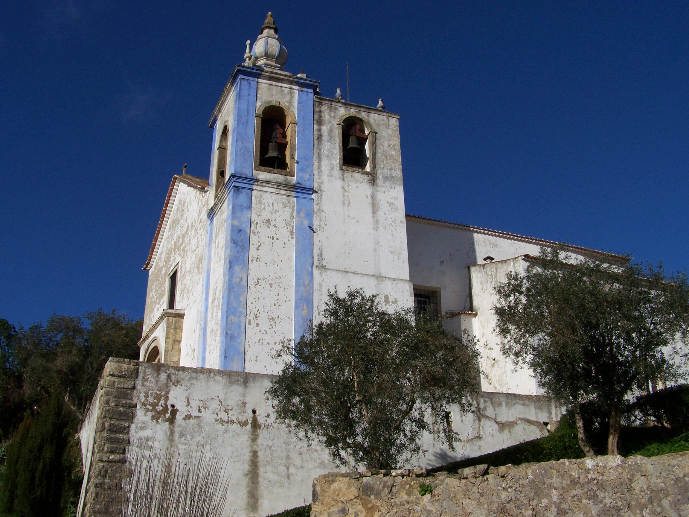 Igreja de Santa Maria do Castelo, situada dentro do Castelo de Torres Vedras.